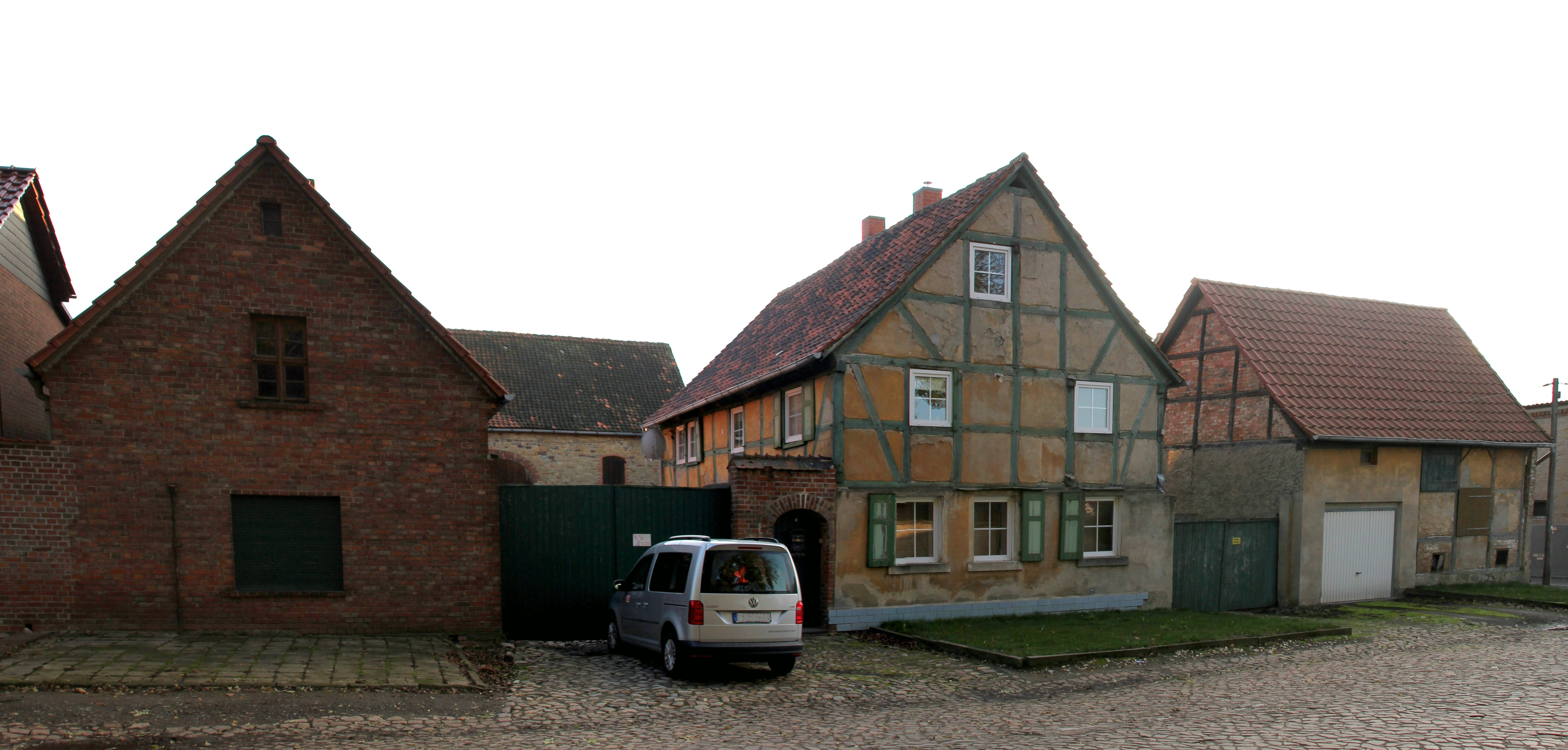 Bauernhof Lange Straße 6 Groß Rodensleben